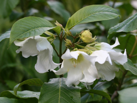 Beaumontia multiflora